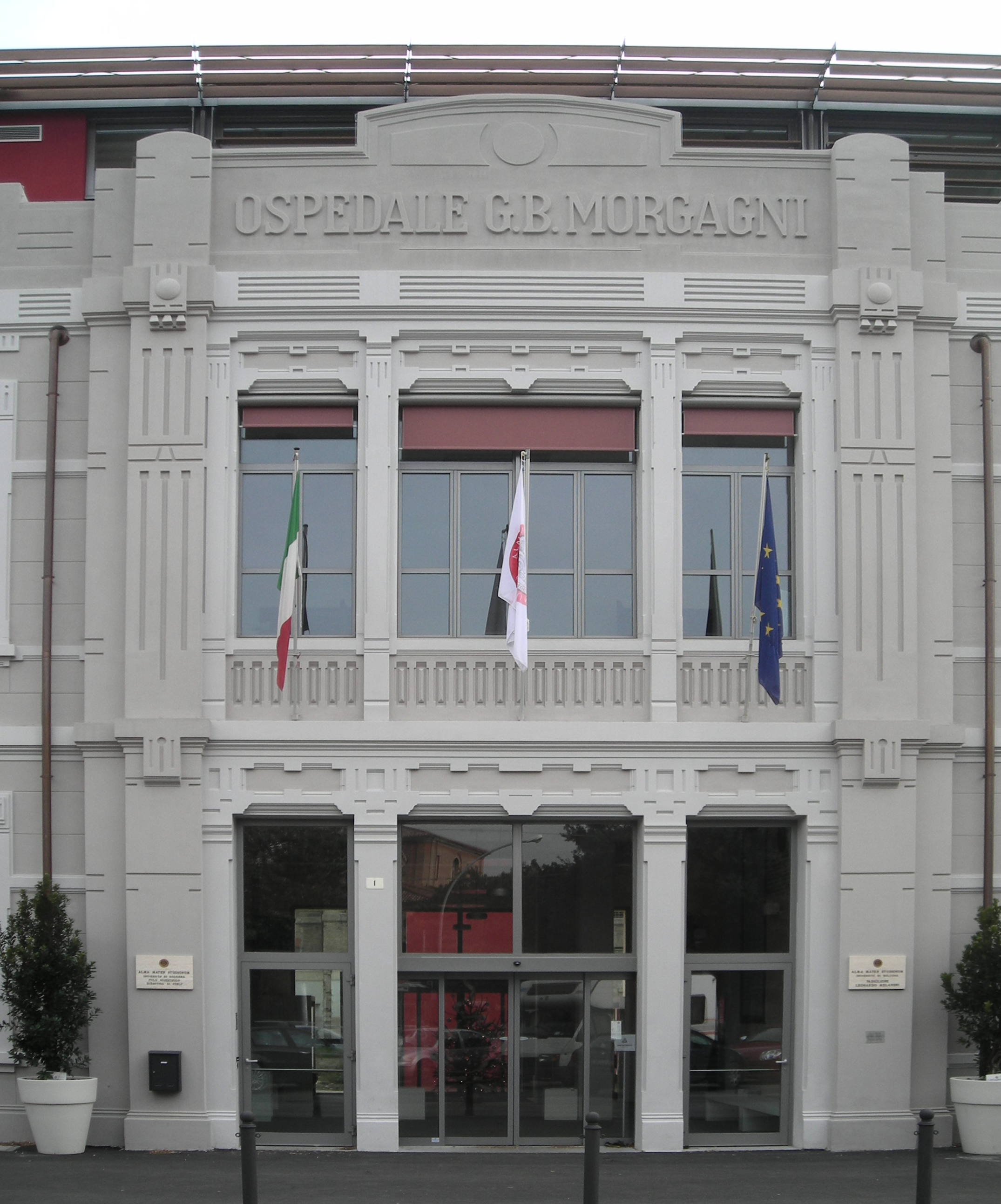 Ingresso del campus universitario di Forlì (Italia) ricavato dall'ex Ospedale Morgagni